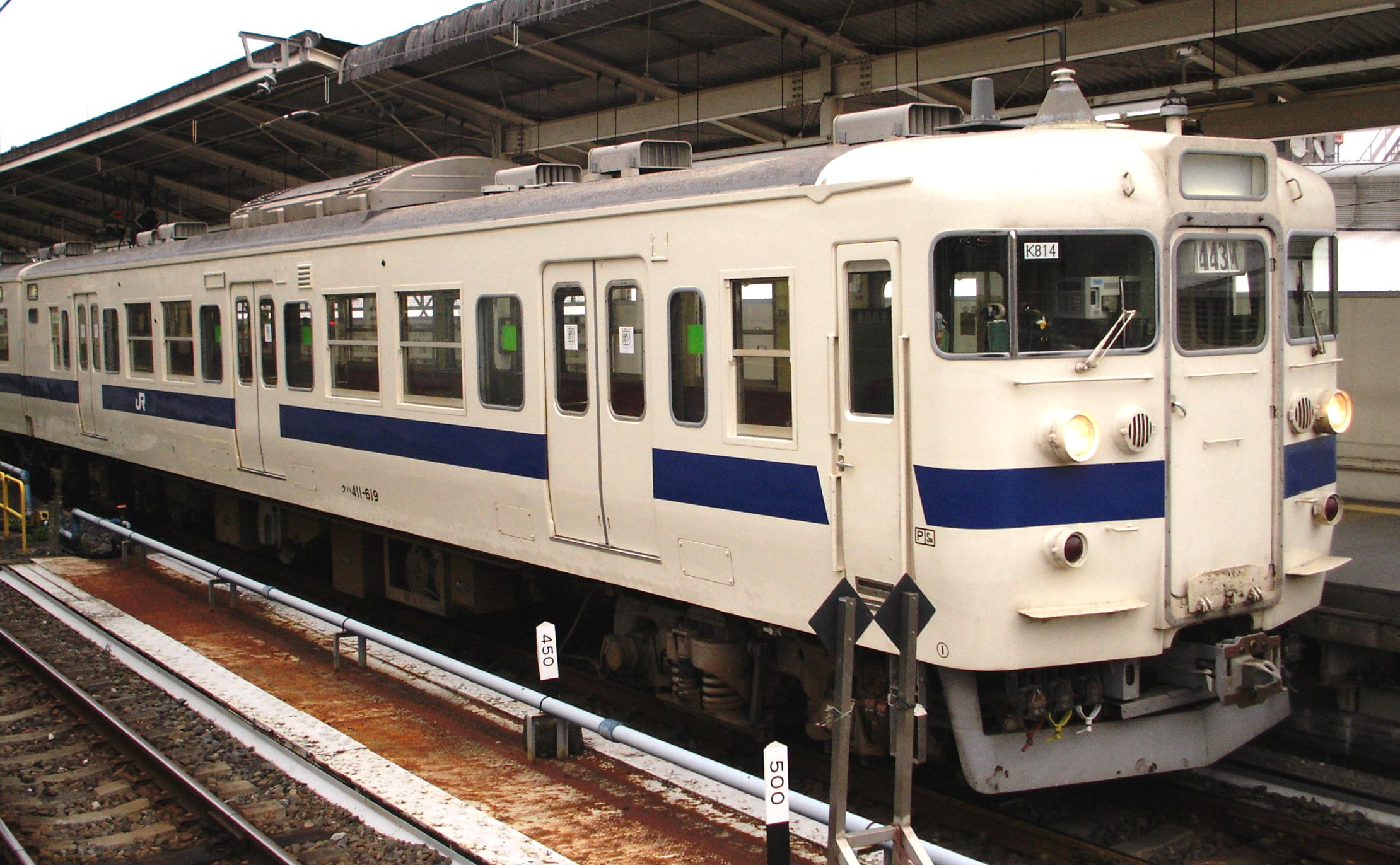 東日本旅客鉄道415系近郊形交直流電車 クハ411-619